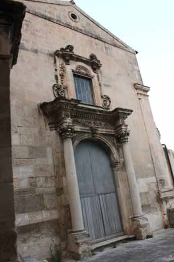 Facciata Chiesa S. Filippo Neri